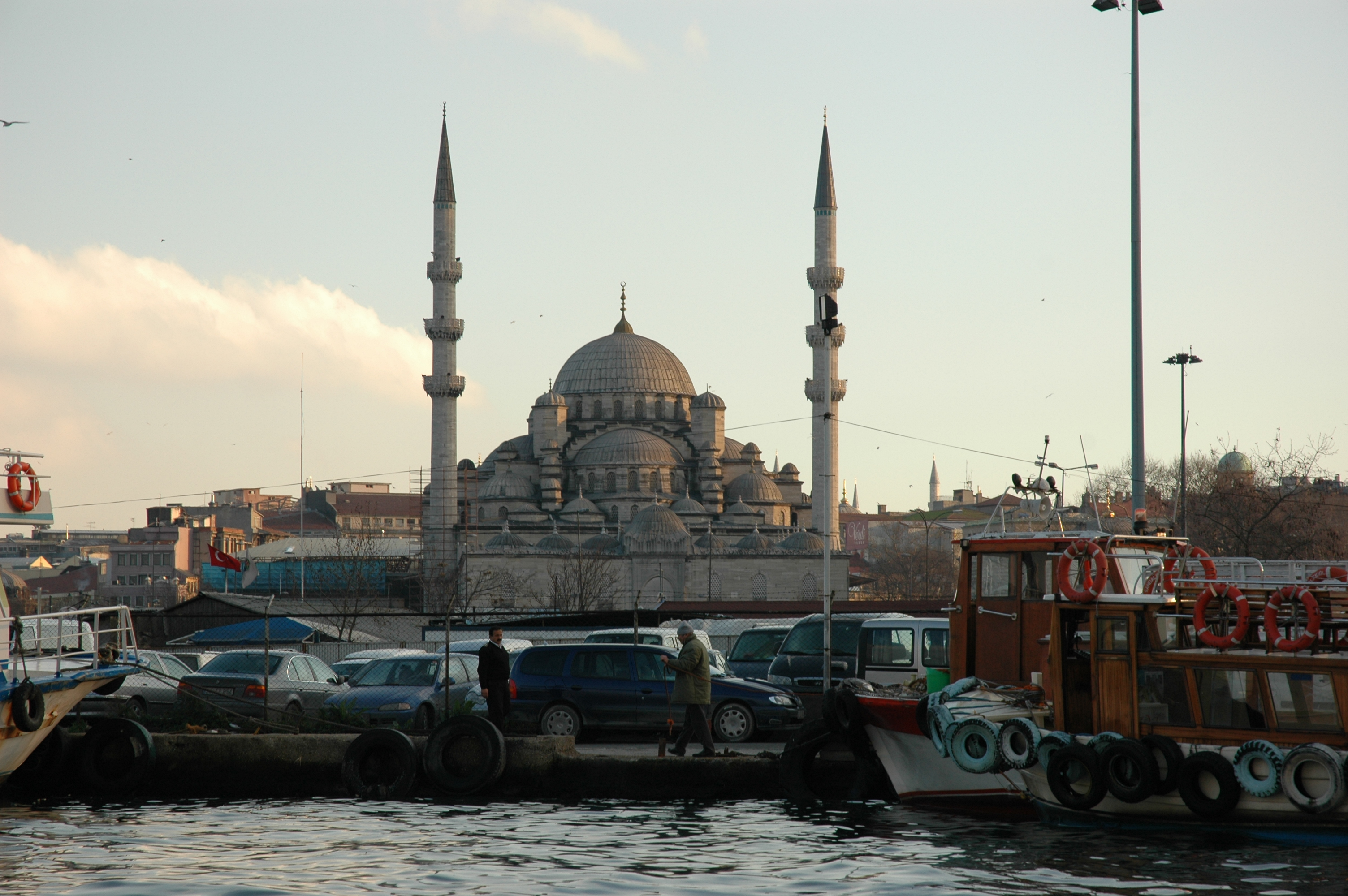 Istanbul - Mesquita Nova des del Bòsfor